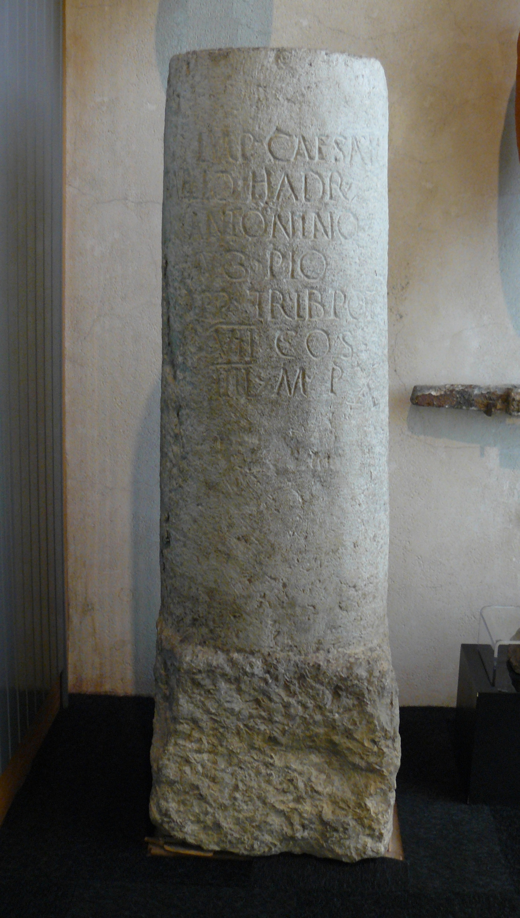 Borne milliaire - 145 ap. J.C. - calcaire dur env. 2 m. - découverte à Mirabel, Ardèche, France - référence épigraphique CIL XII 5565 alias CIL XVII-02, 189 - M.A.N. St-Germain-en-Laye - Inv. n° 35588